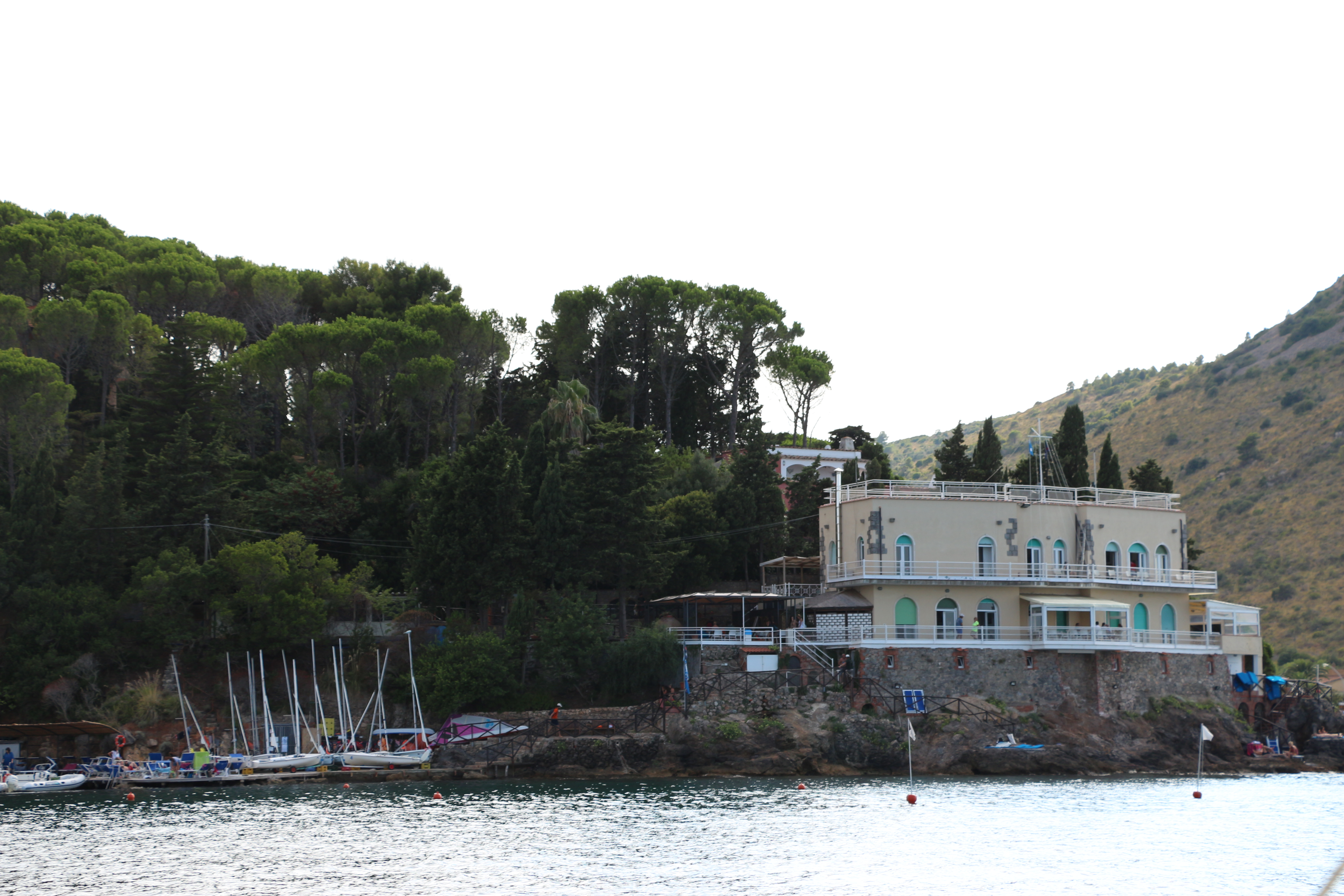 Villa Cortesini loc. Pozzarello di Porto Santo Stefano: sede YCSS.